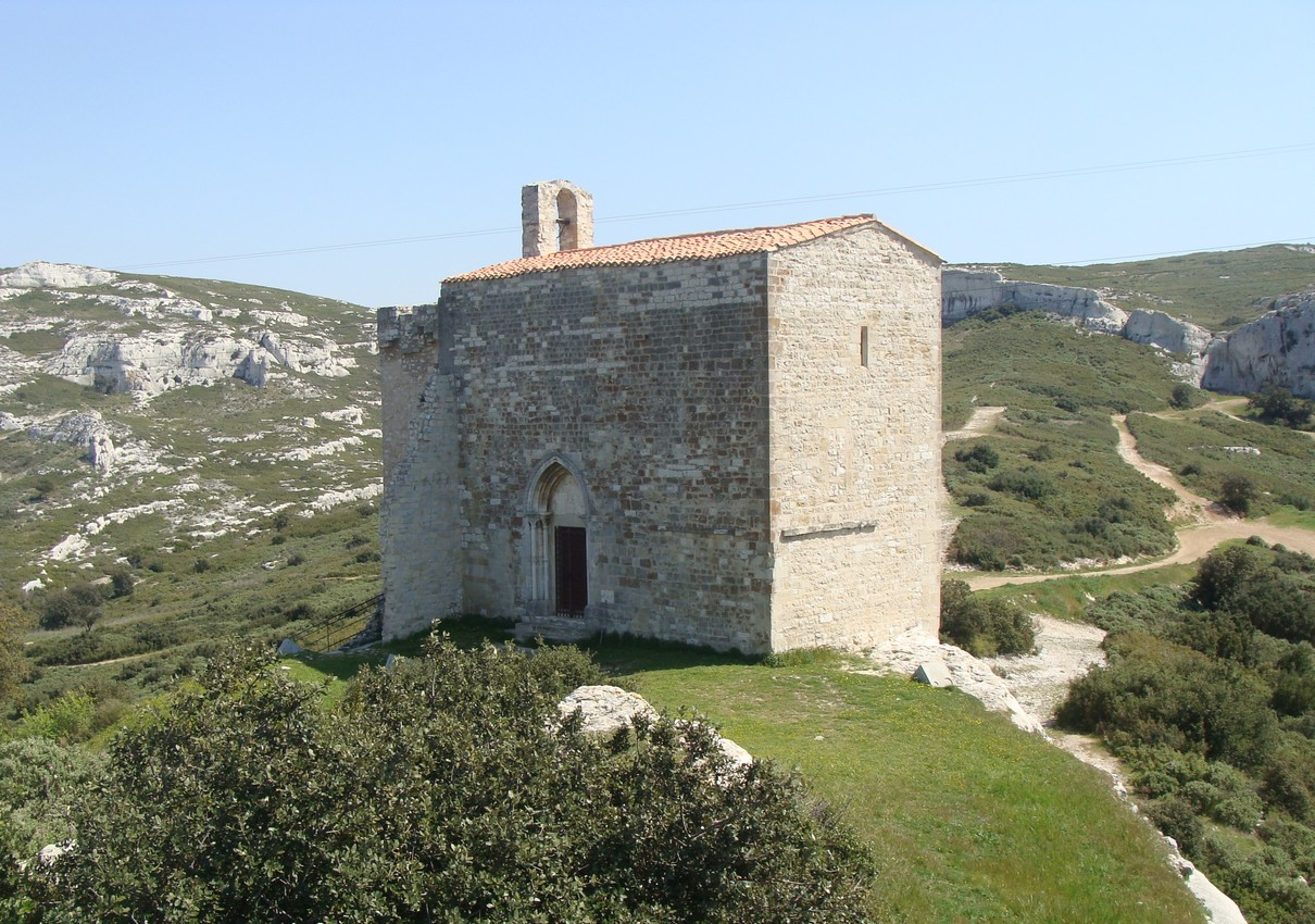 La chapelle de Saint-Michel de Gignac, vue du nord-ouest. Le porche est sur la façade nord, et la face ouest est aveugle. Noter le pan de muraille restant accroché à la chapelle sur la gauche.